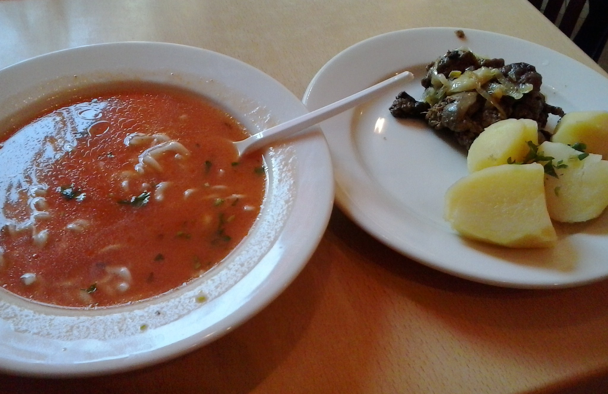 Posiłek w barze mlecznym Kalina na Dębcu w Poznaniu.